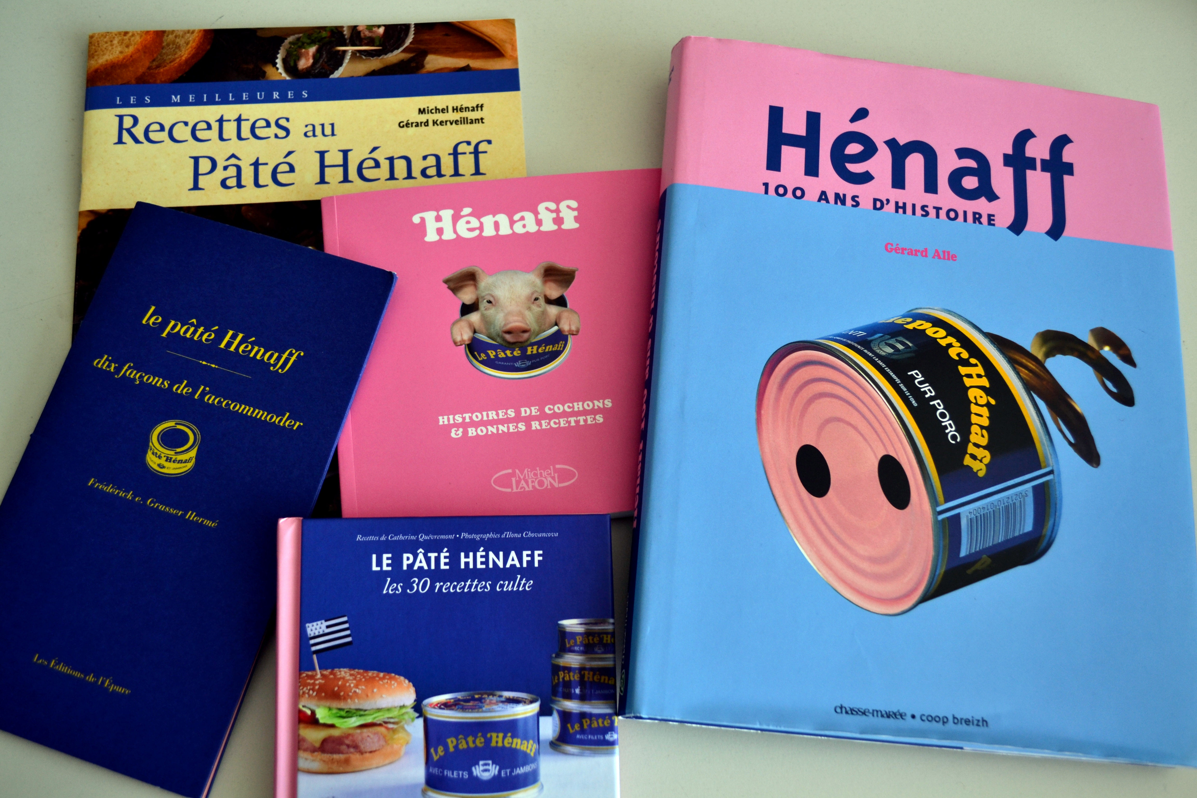 Exposition sur l'histoire du Pâté Hénaff dans le musée de la marque à Pouldreuzic.